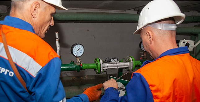 Зйом показників внутрішньобудинкового лічильнику